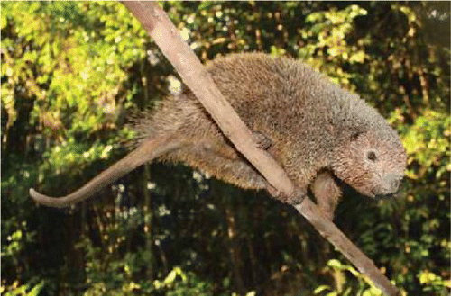 Um indivíduo do ouriço-preto